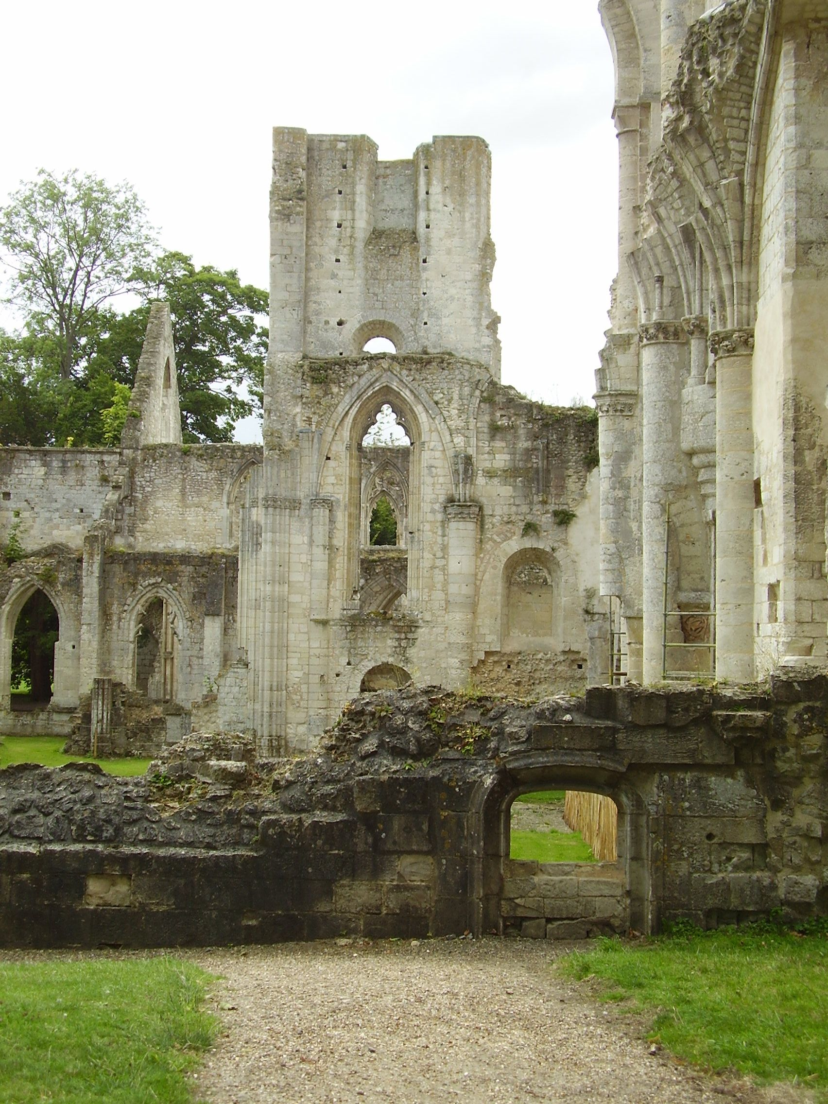 Abbaye de Jumièges, the most beautiful ruins in France